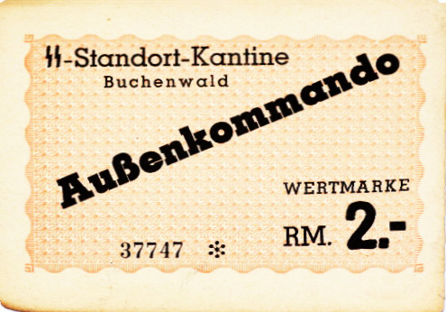 2 Reichsmark Wertmarke